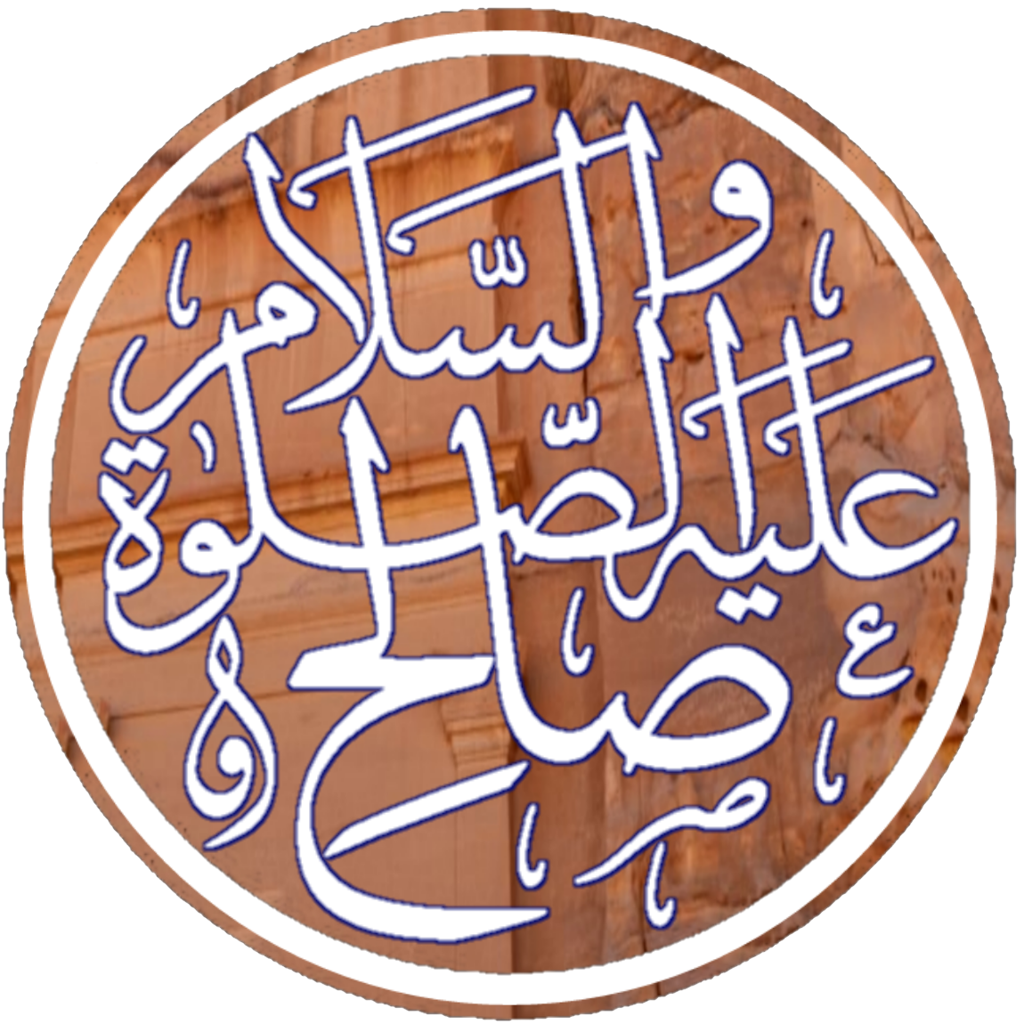 صالح علیہ الصلوۃ والسلام